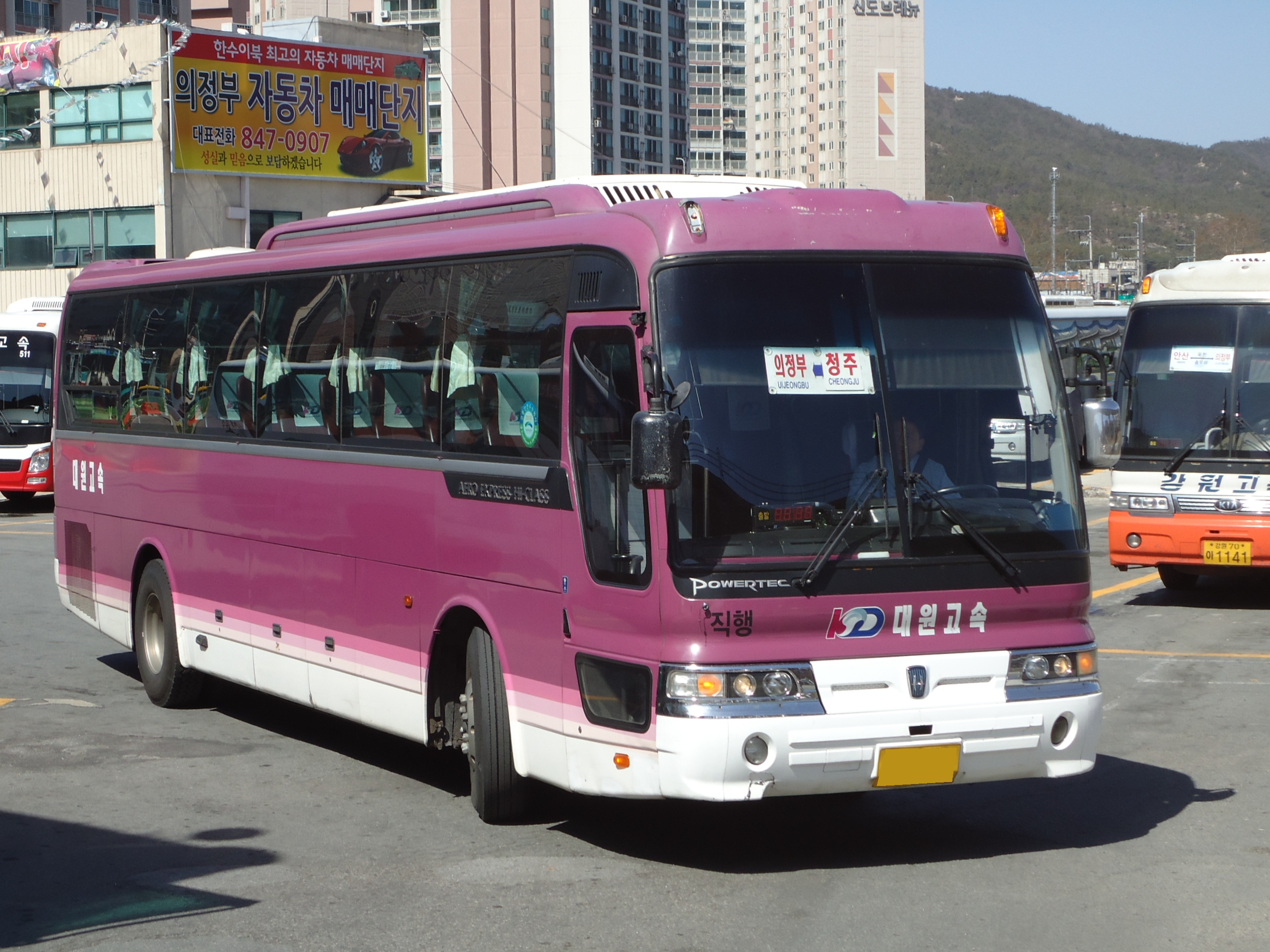 대원고속 뉴 에어로 익스프레스 하이 클래스 (청주-의정부) 이 차량을 전에도 본 적이 있는데 랜덤으로 운행해서 언제 이 차량이 다시 올지는 모릅니다.